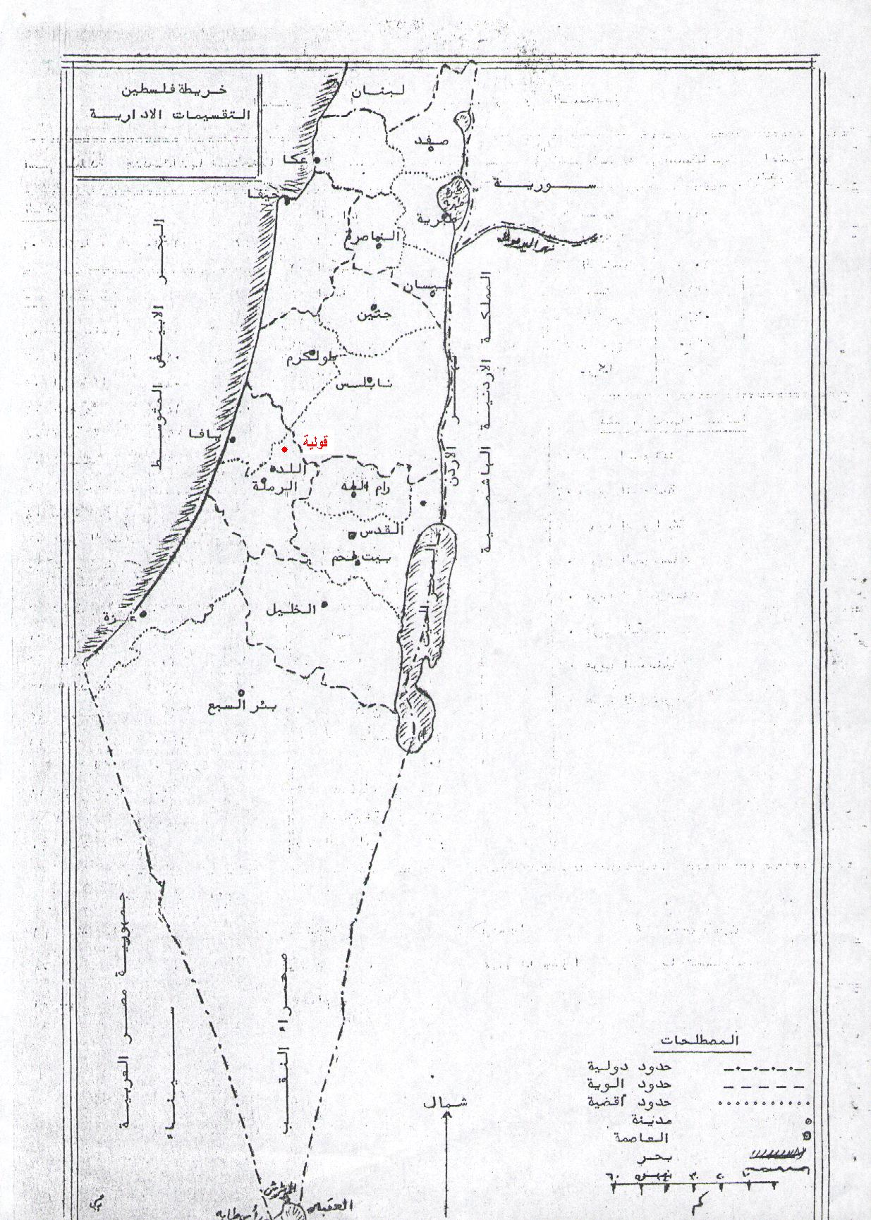 خارطة فلسطين كامة معين عليها قرية قولة